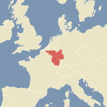 Sujet: D'Groussregioun (Saarland - Loutrengen - Groussherzogtum Lëtzebuerg - Rheinland-Pfalz - franséisch- an däitschsproocheg Communautéit aus der wallounescher Belsch) an Europa.